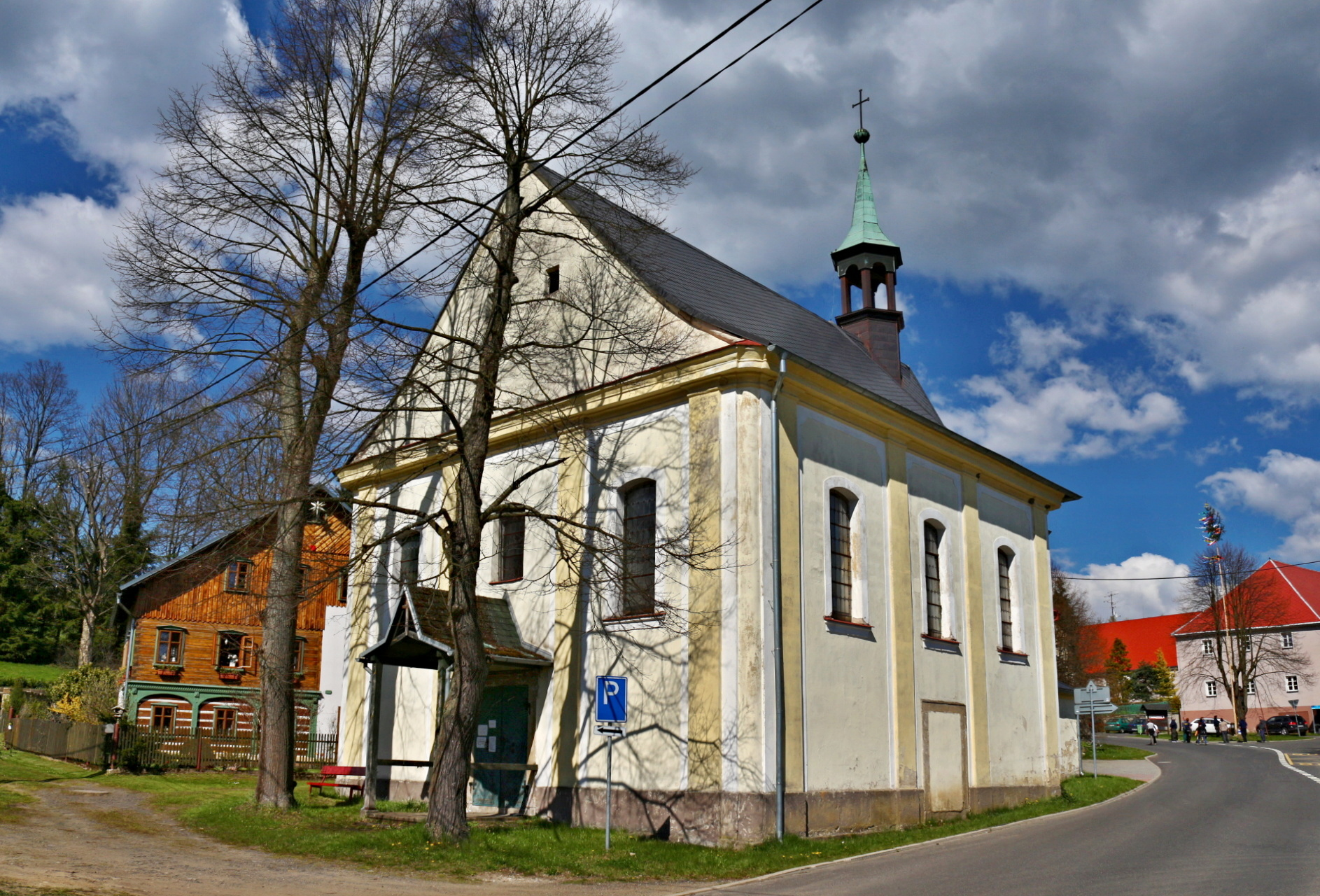 Kostel 14 Sv. pomocníků v Krompachu